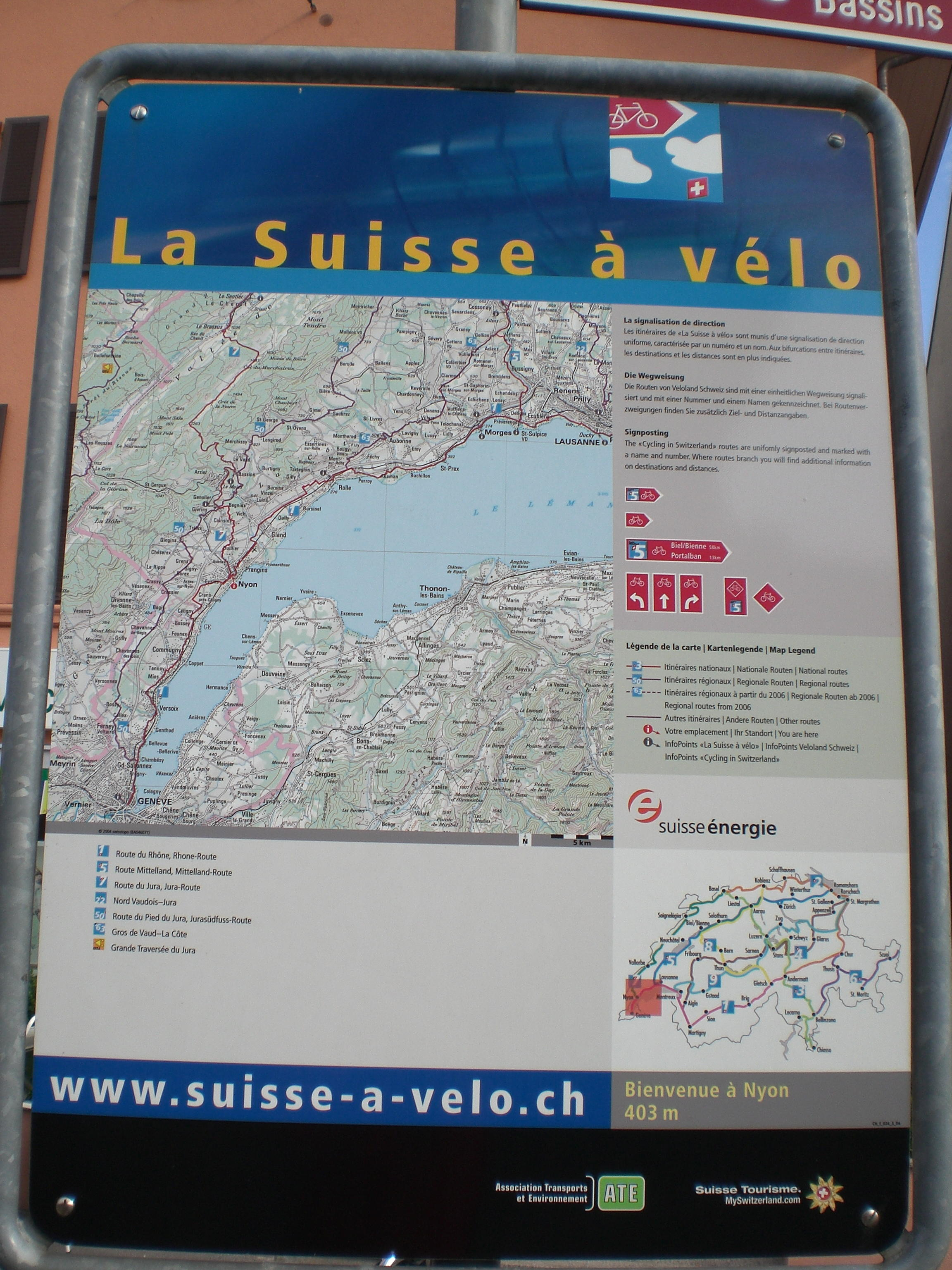 Plan de situation, départ de la route 7 de la Suisse à vélo